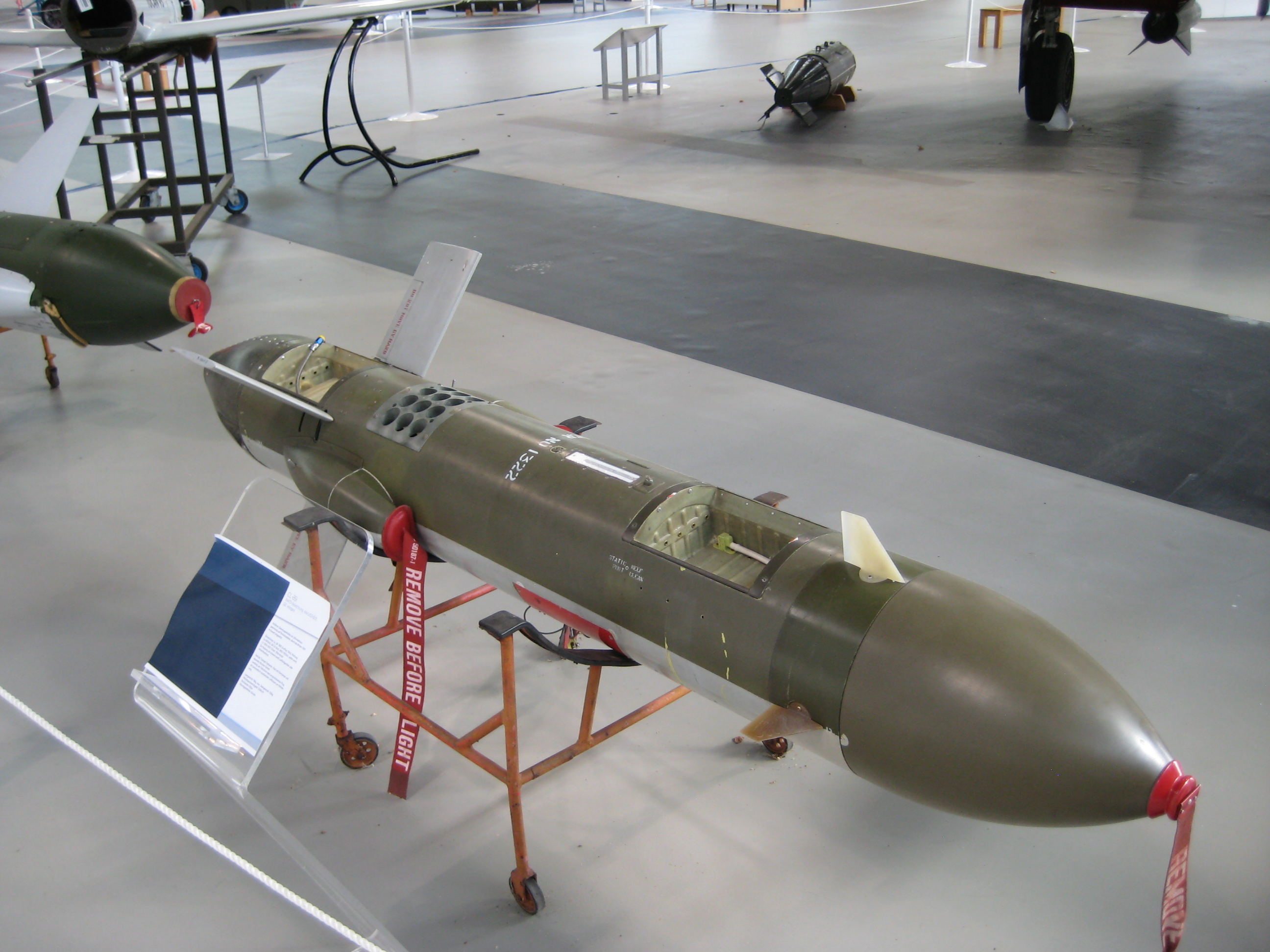 Artillerie Zielortungsdrohne